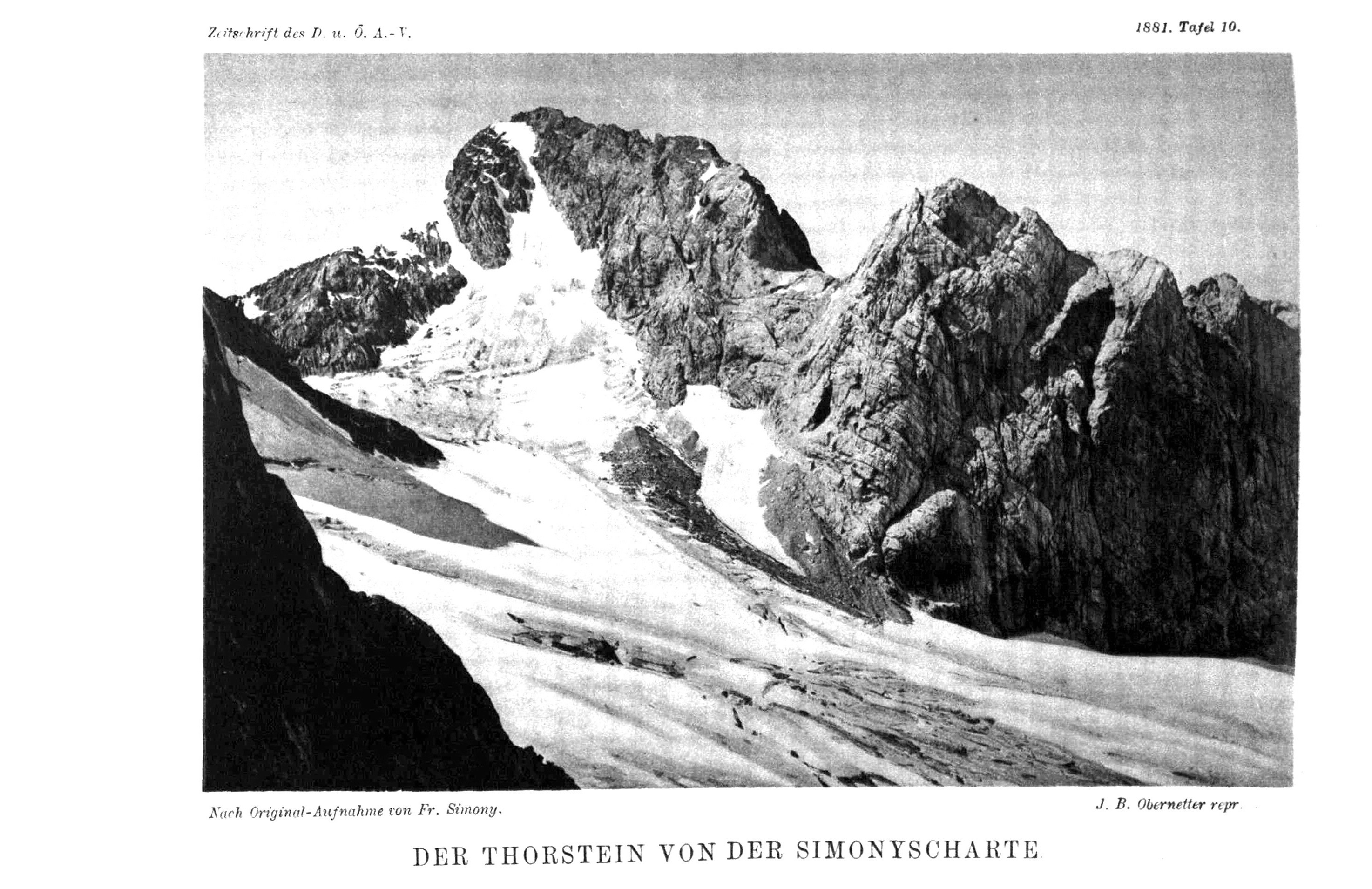 Der Thorstein von der Simonyscharte aus Zeitschrift des Deutschen und Oesterreichischen Alpenvereins 1881 Band 12